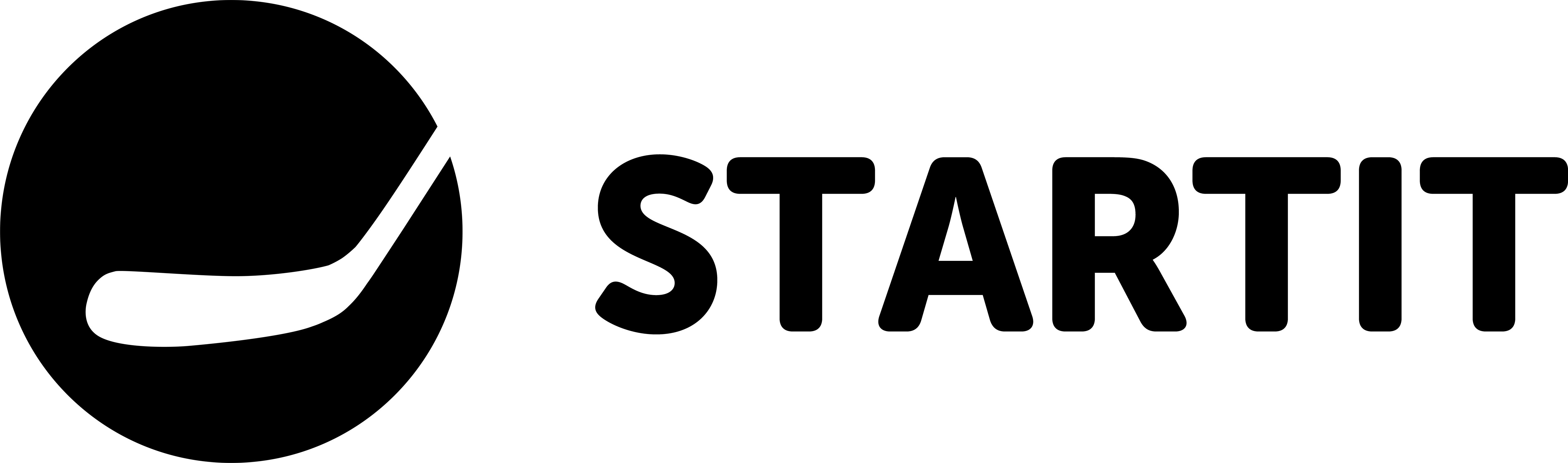 Startit logo